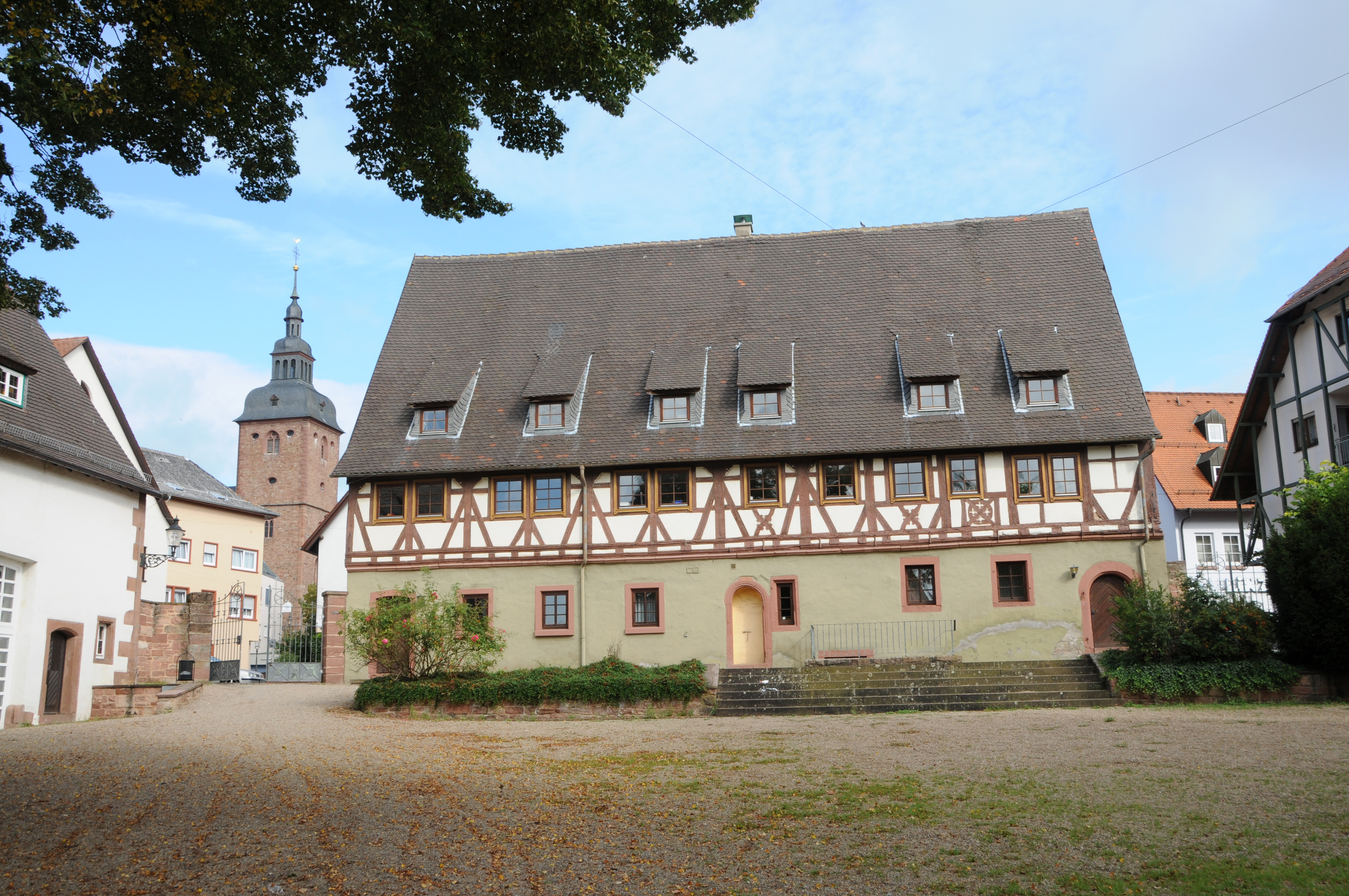 Belz'sches Haus, Buchen (Odenwald), Haagstraße 10, im Museumsareal